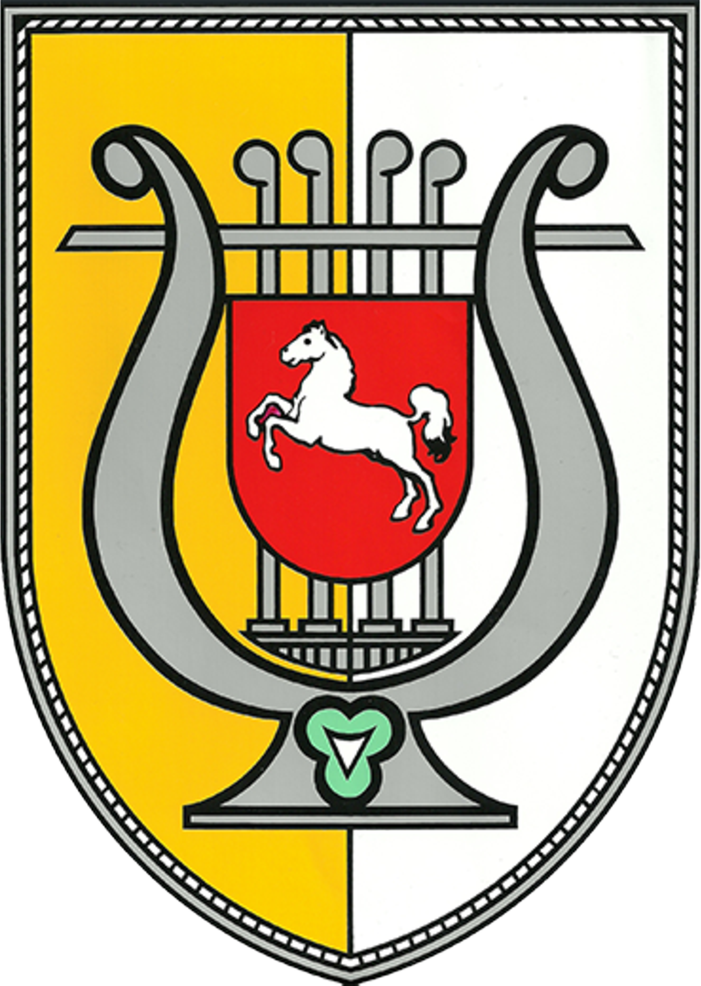 This file shows the internal coat of arms of Heeresmusikkorps Hannover (HMusKorps Hannover) of the Bundeswehr, the German Federal Defence Force. → more → help on abbreviations